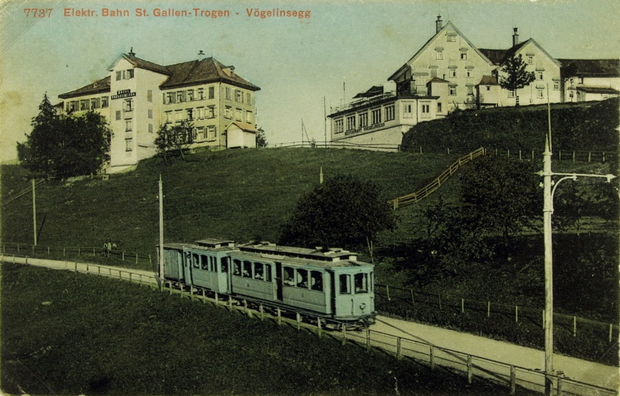 Die Trogenerbahn fährt vor dem später abgebrochenen Hotel Vögelinsegg vorbei.